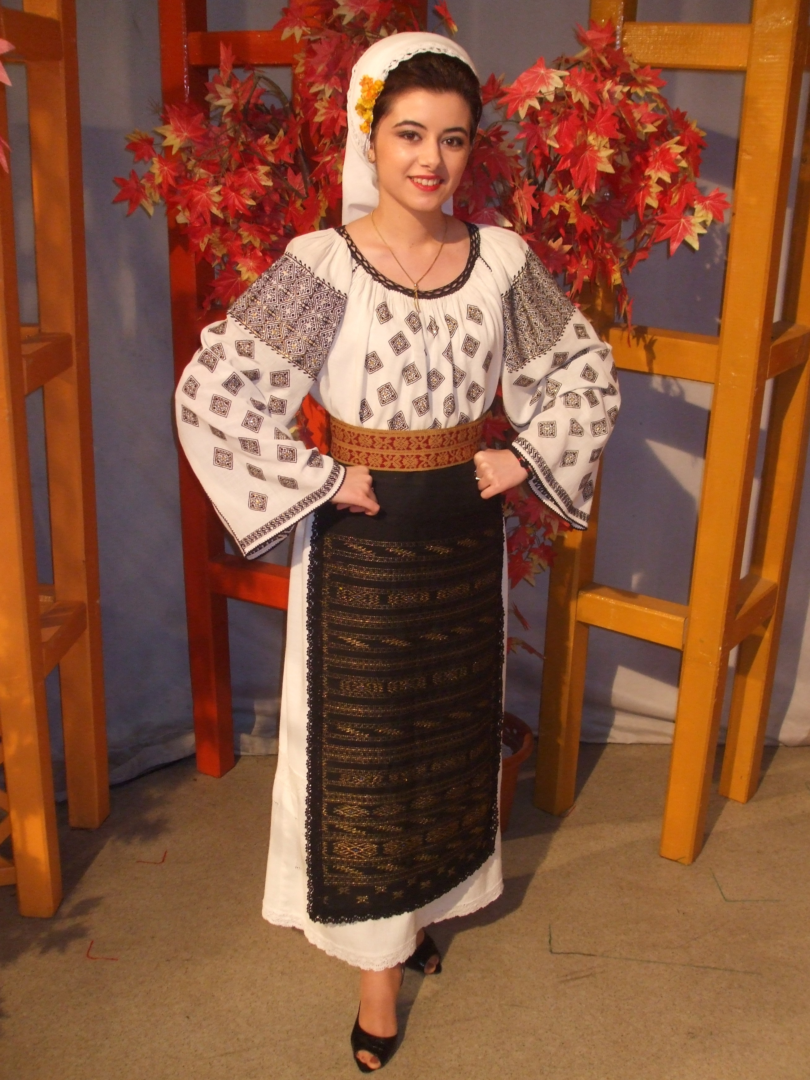 Izabela Tomița